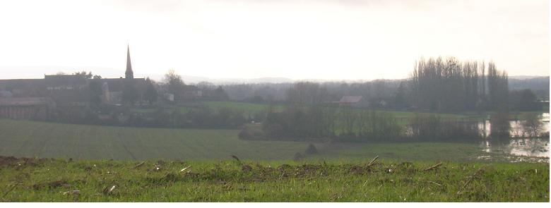 photo du village un apres midi de novembre 2007